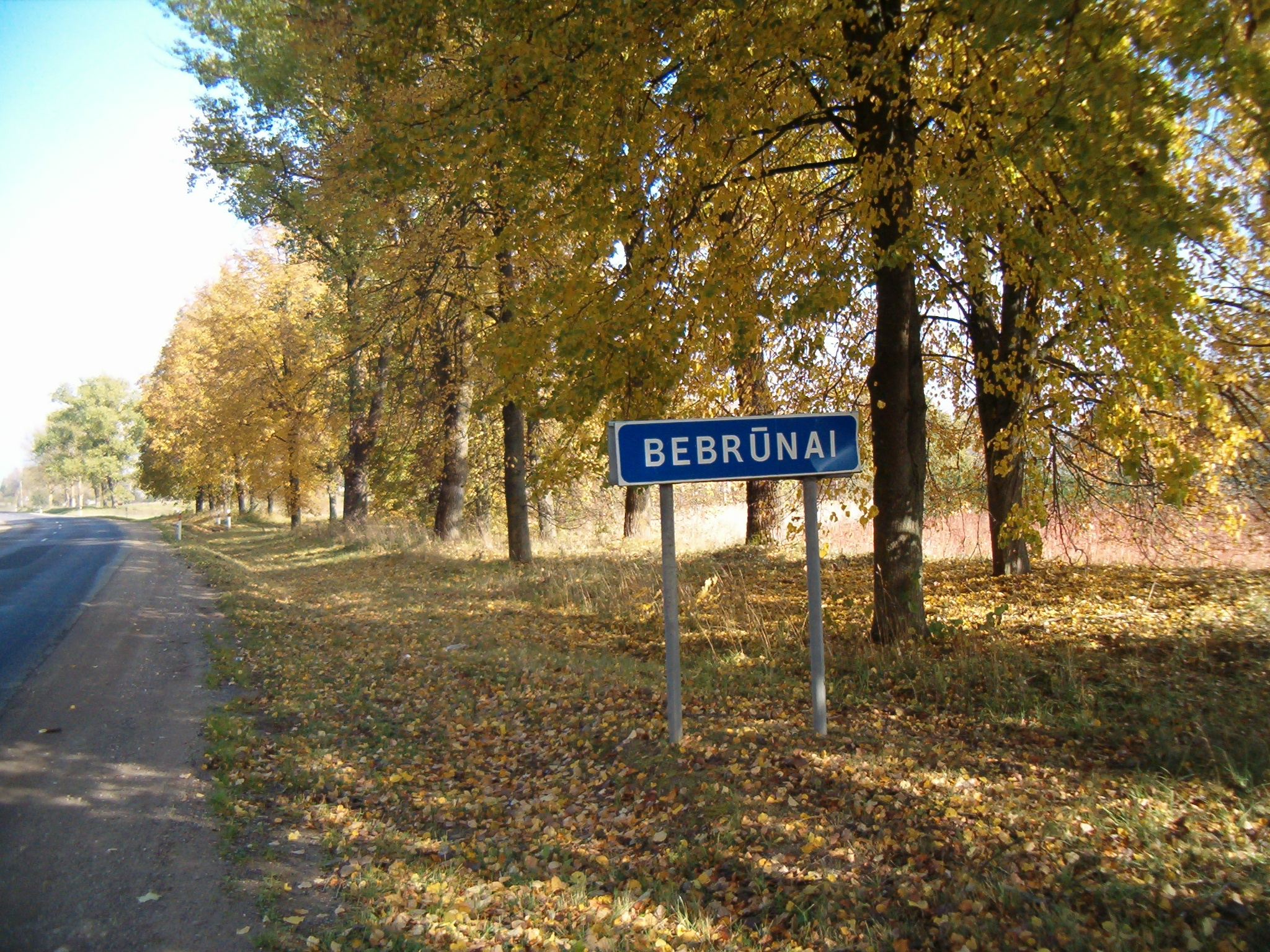 Kavarskas, Lithuania